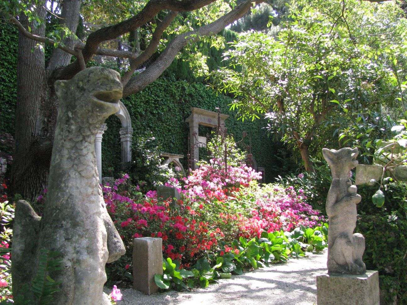 Villa Ephrussi de Rothschild